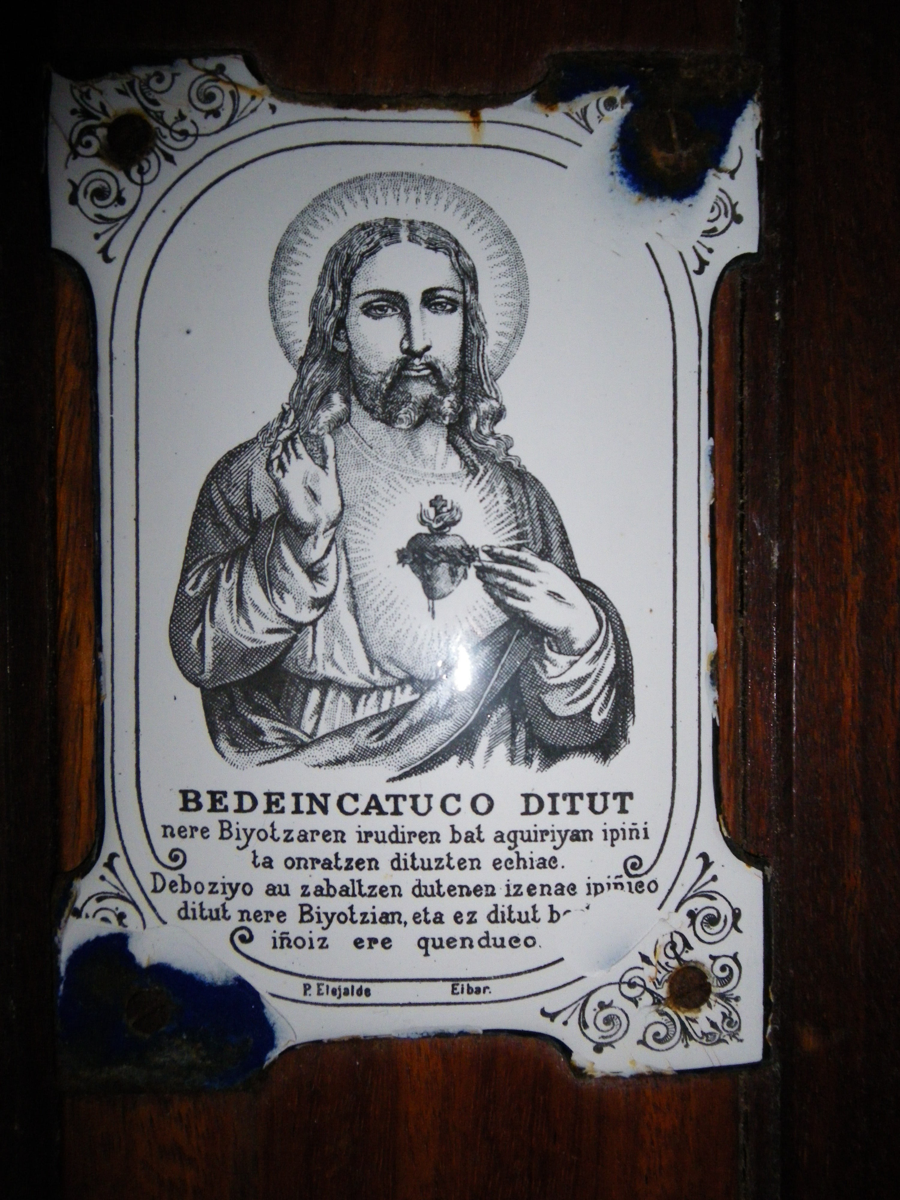 Bedeinkatuko ditut nire Bihotzaren irudiren bat agerian ipini eta onratzen dituzten etxeak. Debozio hau zabaltzen dutenen izenak ipiniko ditut nire bihotzean, eta ez ditut bertatik inoiz ere kenduko.